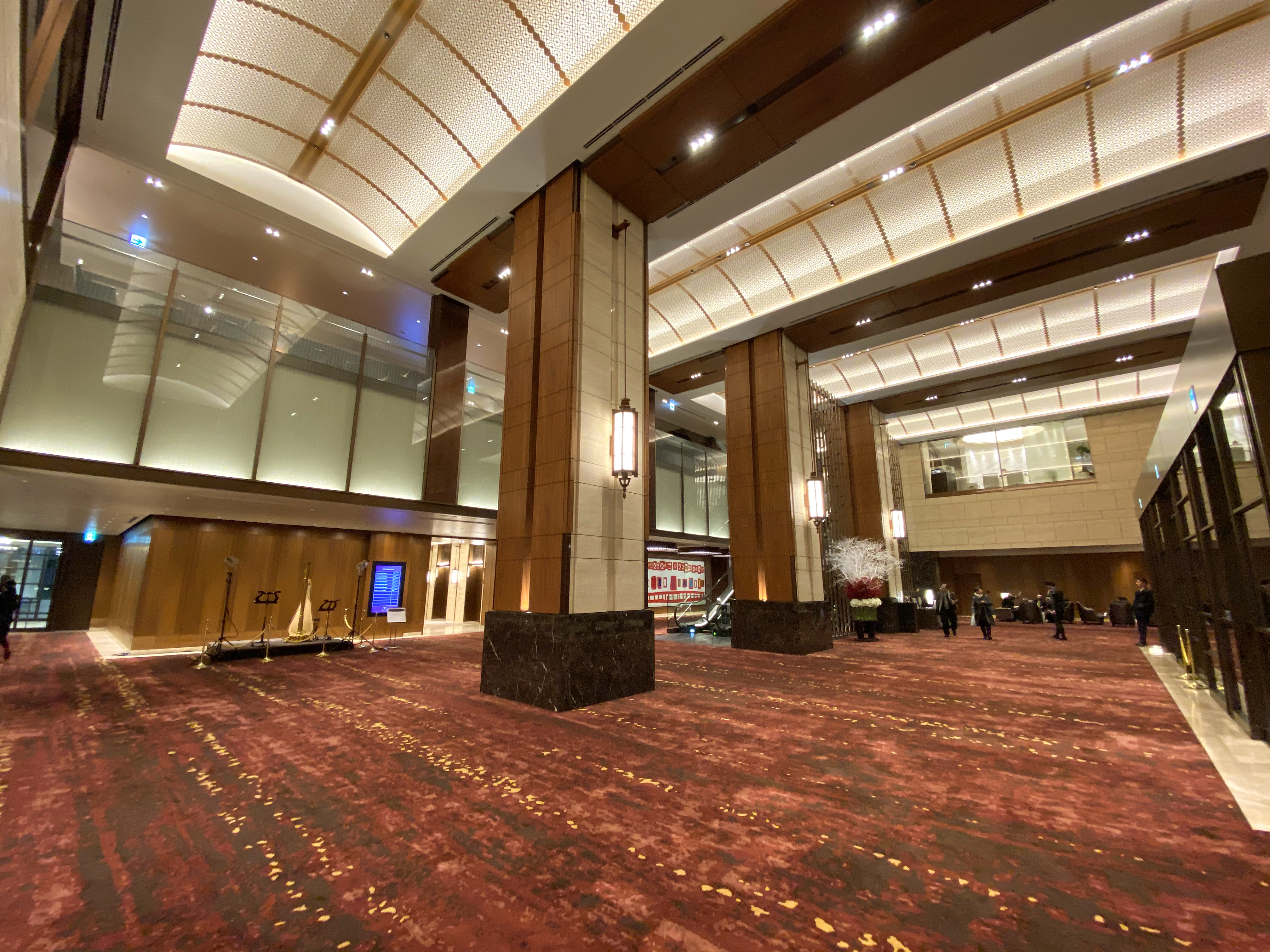 Tōkyō Kaikan